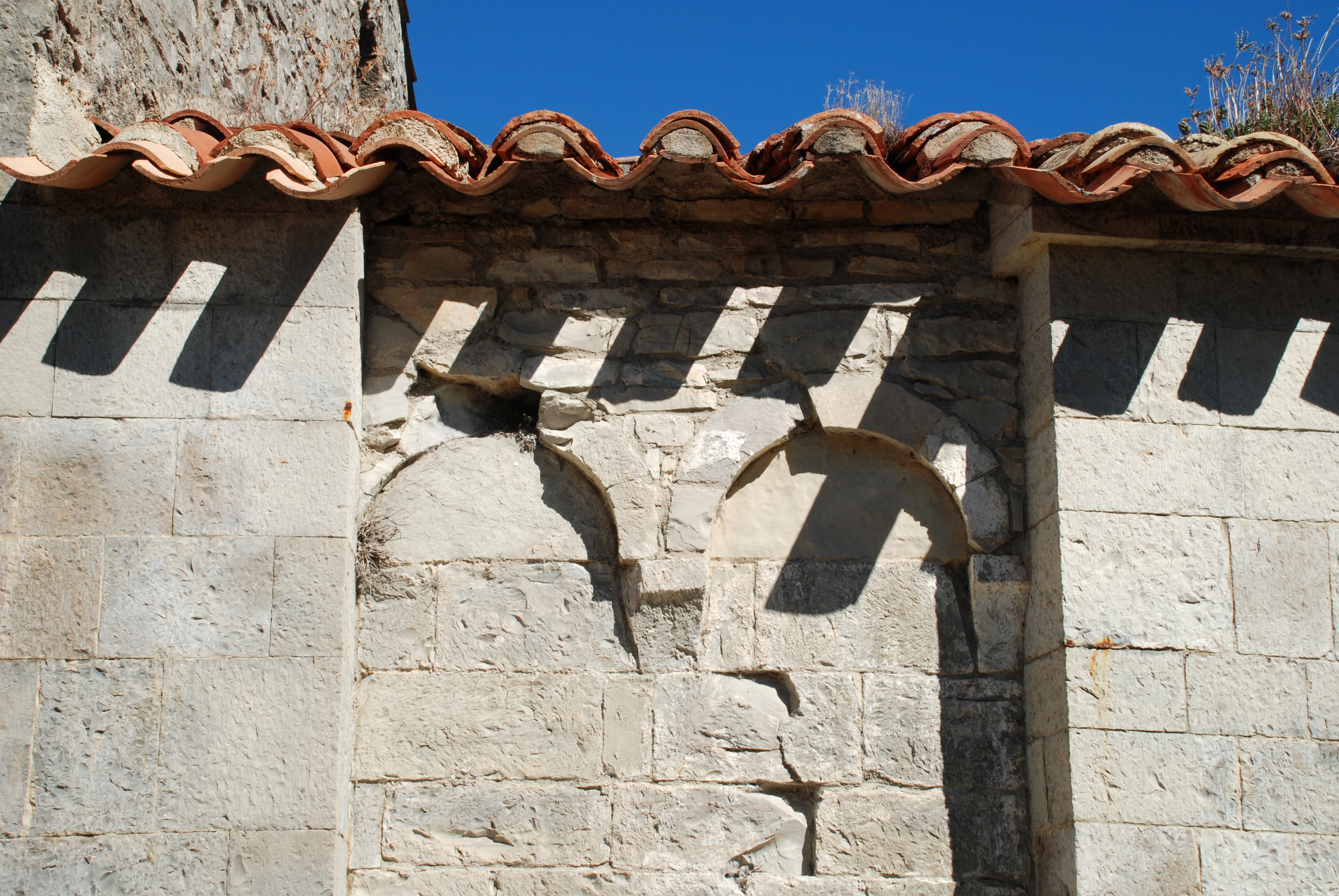 France - Hérault - Brissac - Chapelle Saint-Étienne d'Issensac